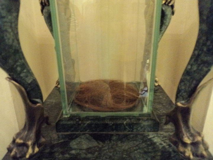 Косите на Васил Левски в параклиса „Всех святих болгарских" в националния музей "Васил Левски", Карлово.